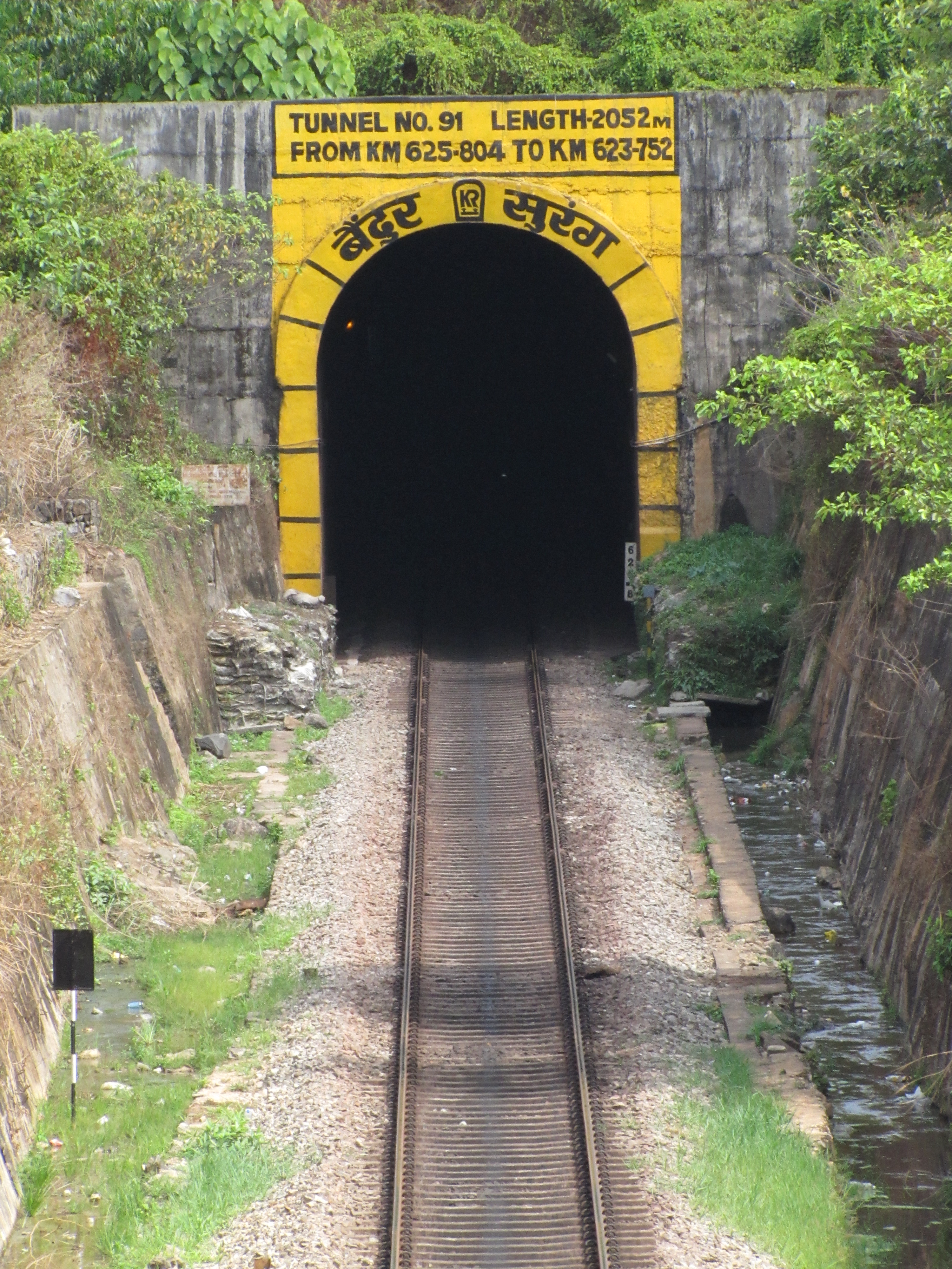 A tunnel in Konkan Railway at Byndoor, Karnataka